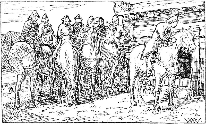 Wilhelm Wetlesen: Illustration for Haraldsønnenes saga (Inges saga), Heimskringla 1899-edition. nn: «Kong Sigurd lyder på kvinnesong utanfor huset.»